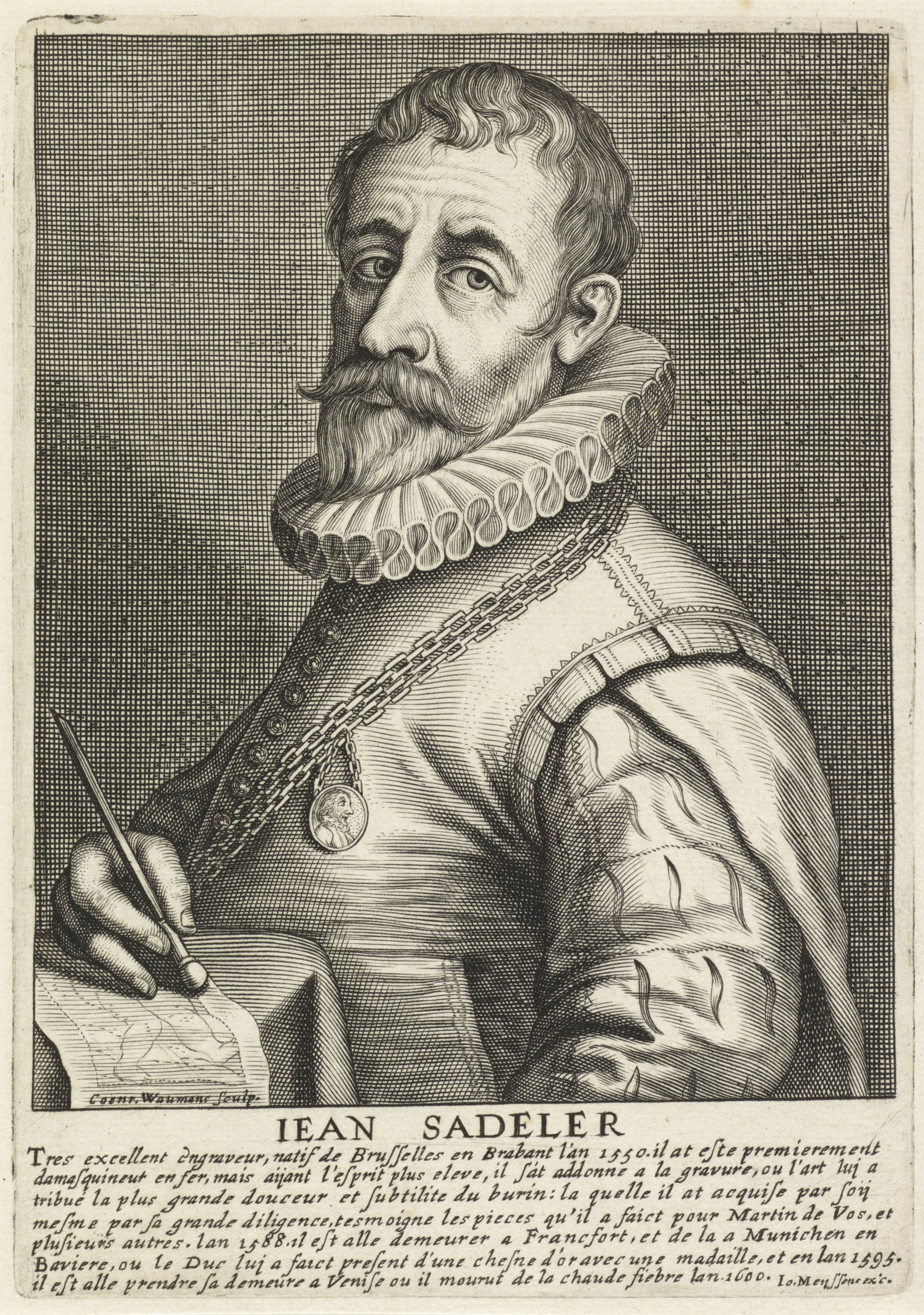 Portrait de Johan Sadeler (1550-1600) gravé par Conraed Waumans tiré de «Image de divers hommes d'esprit sublime, qui par leur art et science devraient vivre éternellement et desquels la louange et renommée faict estonner le monde», Anvers : J. Meyssens, 1649.